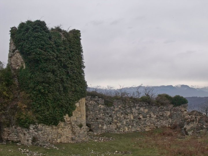 ჭაქვინჯის ციხე